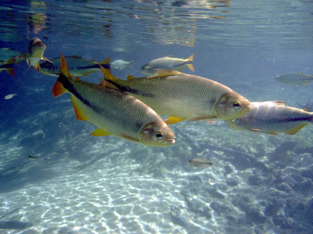 Piraputangas no Rio da Prata (Brycon hilarii), em Bonito.Piraputanga Tango